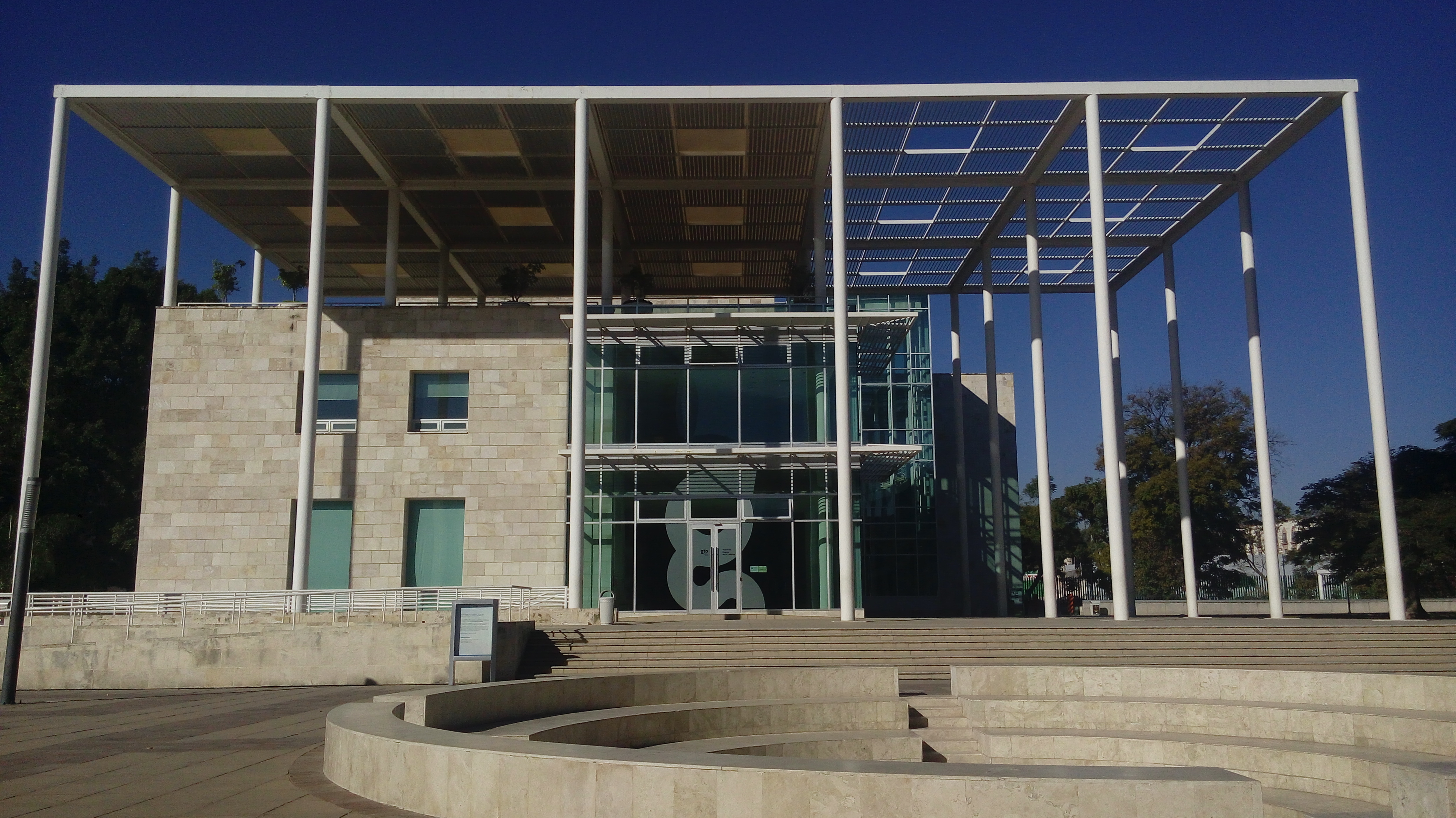 Biblioteca Central Estatal en el FORUM.